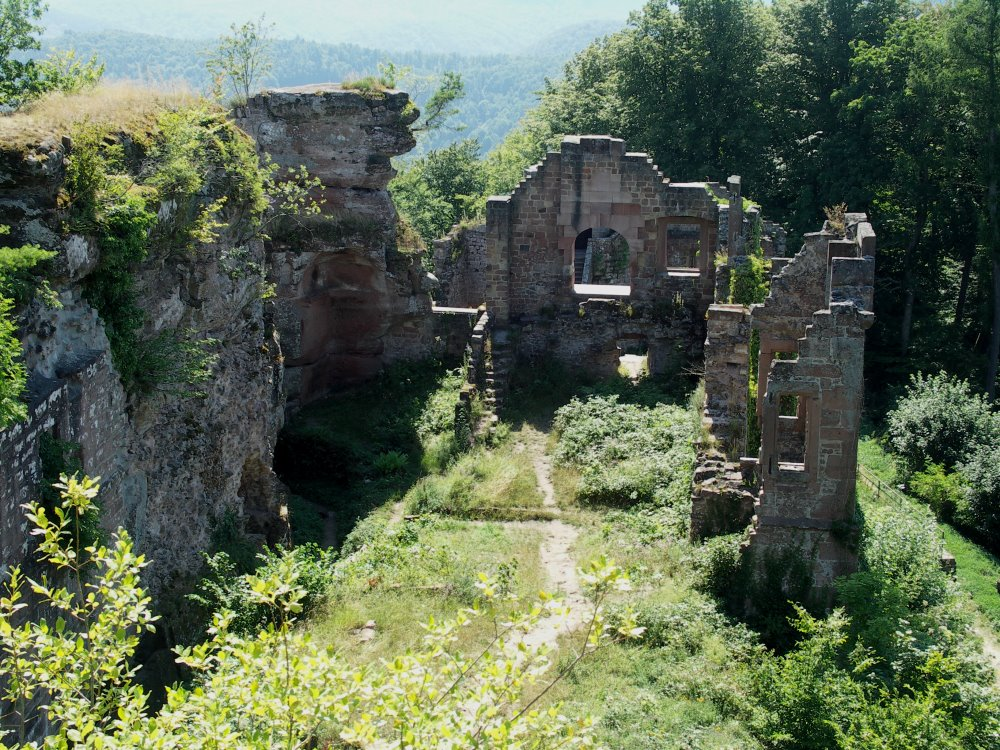 Neuscharfeneck, Reste vom Palas Datum: 17.7.2005 Fotograf: Peter Schmenger